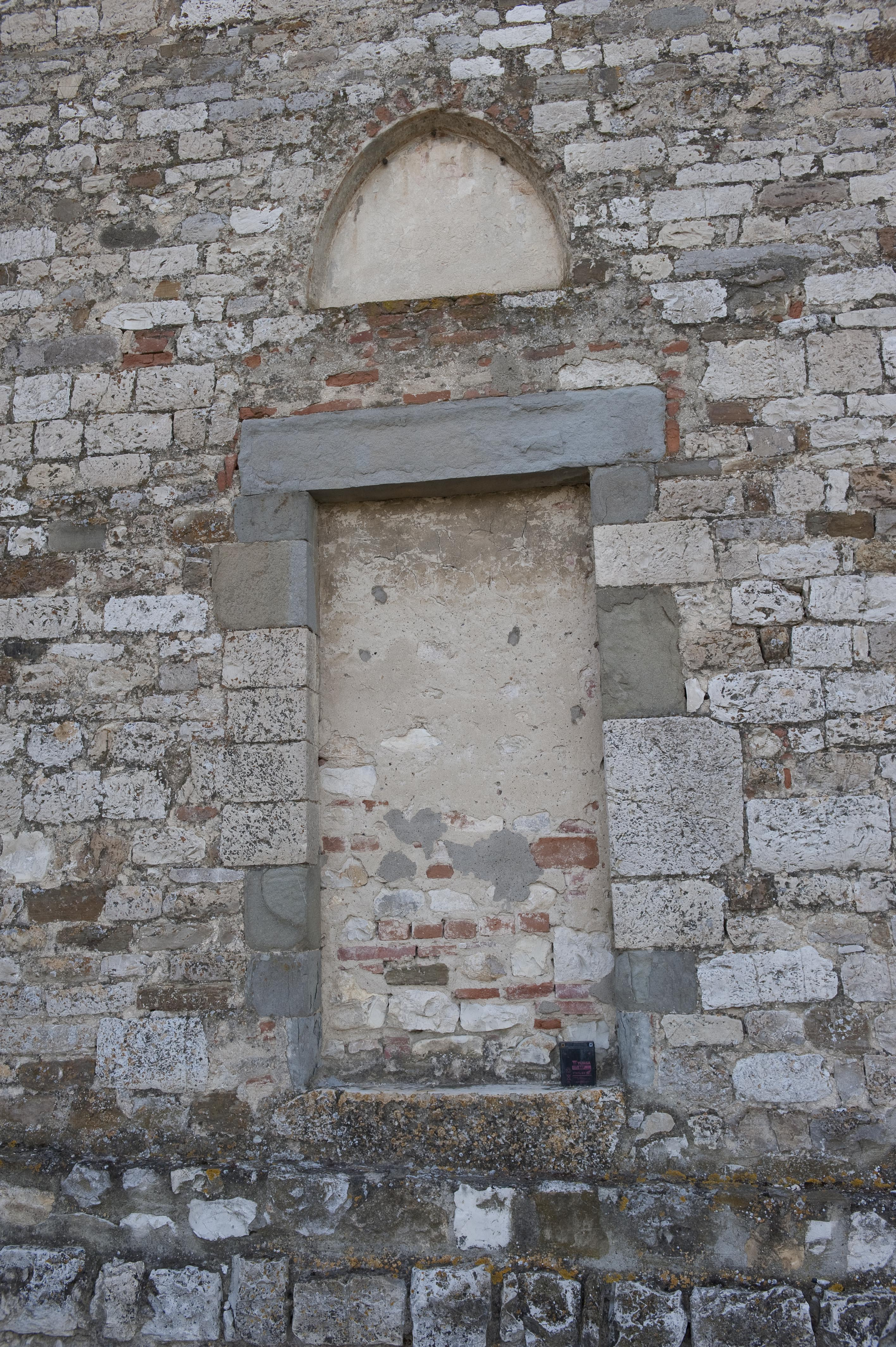 Portale laterale della chiesa di Santa Maria a Quarto, Bagno a Ripoli